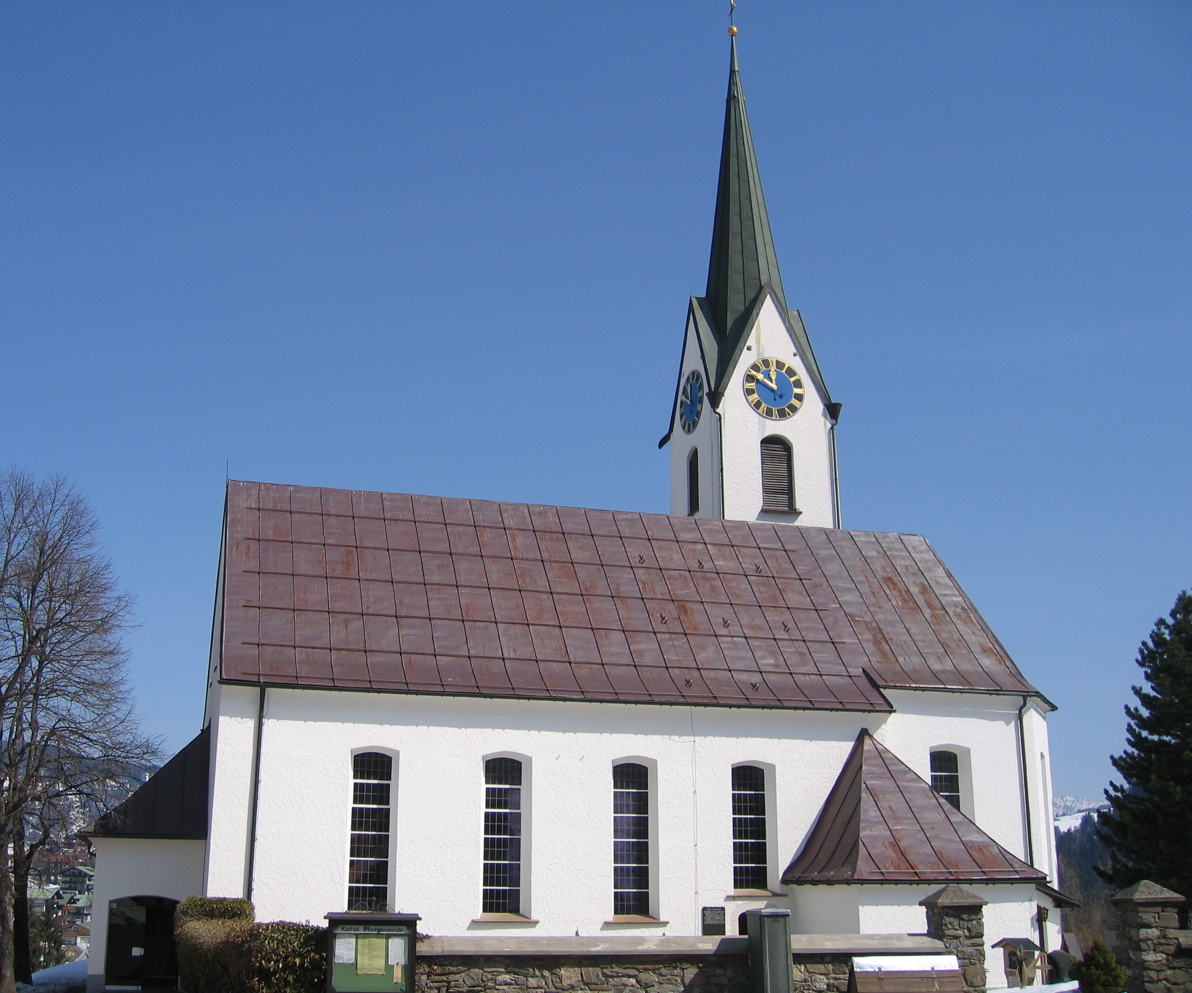 Katholische Pfarrkirche St. Anna in Hirschegg, Kleinwalsertal.